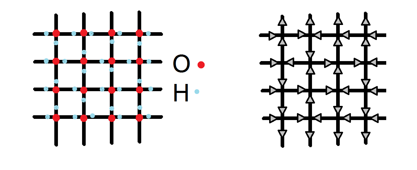 Équivalence entre le modèle de glace carrée et le modèle à 6 vertex